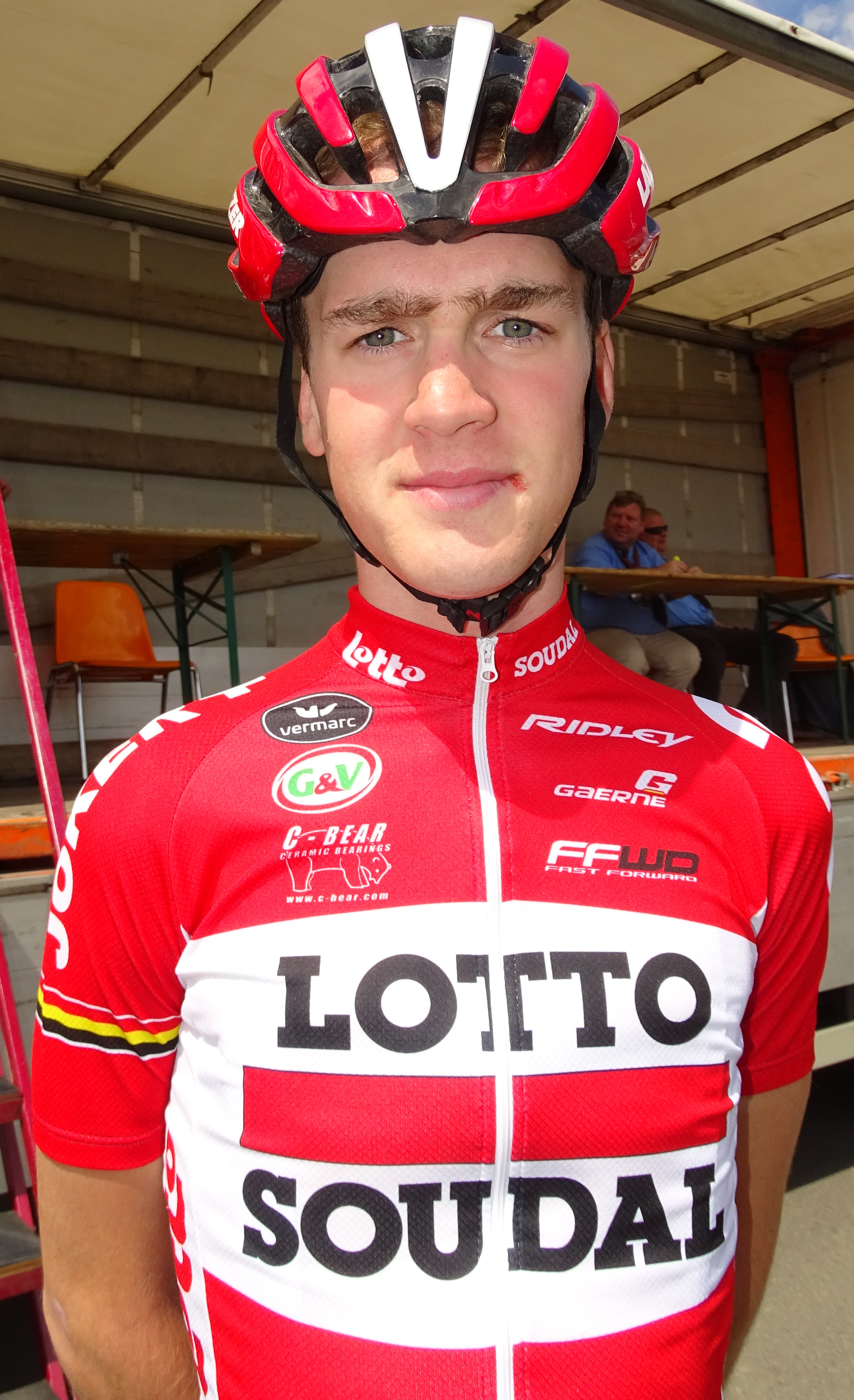 Reportage réalisé le dimanche 7 juin à l'occasion du départ du Mémorial Philippe Van Coningsloo 2015 à Wavre, Belgique.